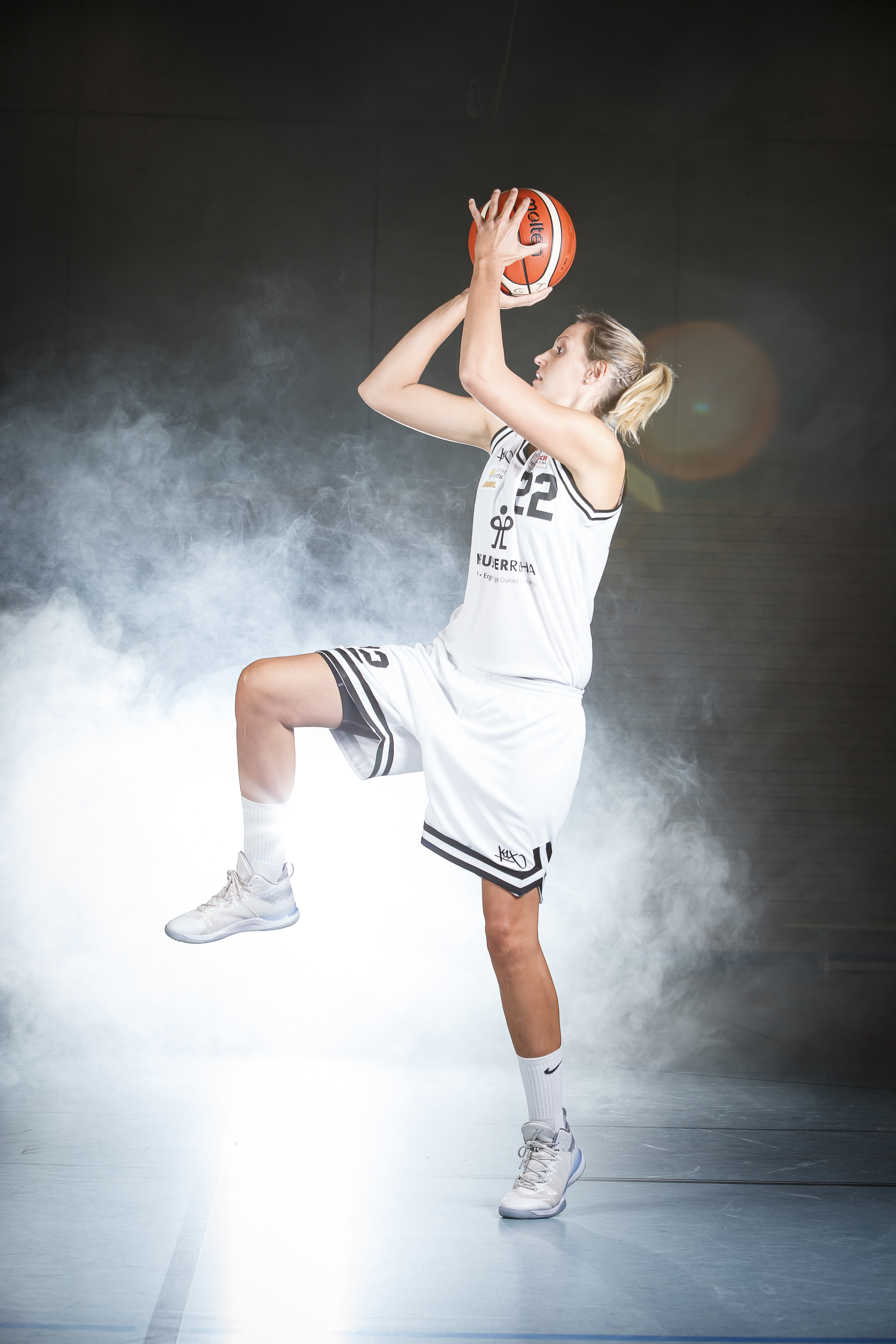 Fotograf: Jens Hecker